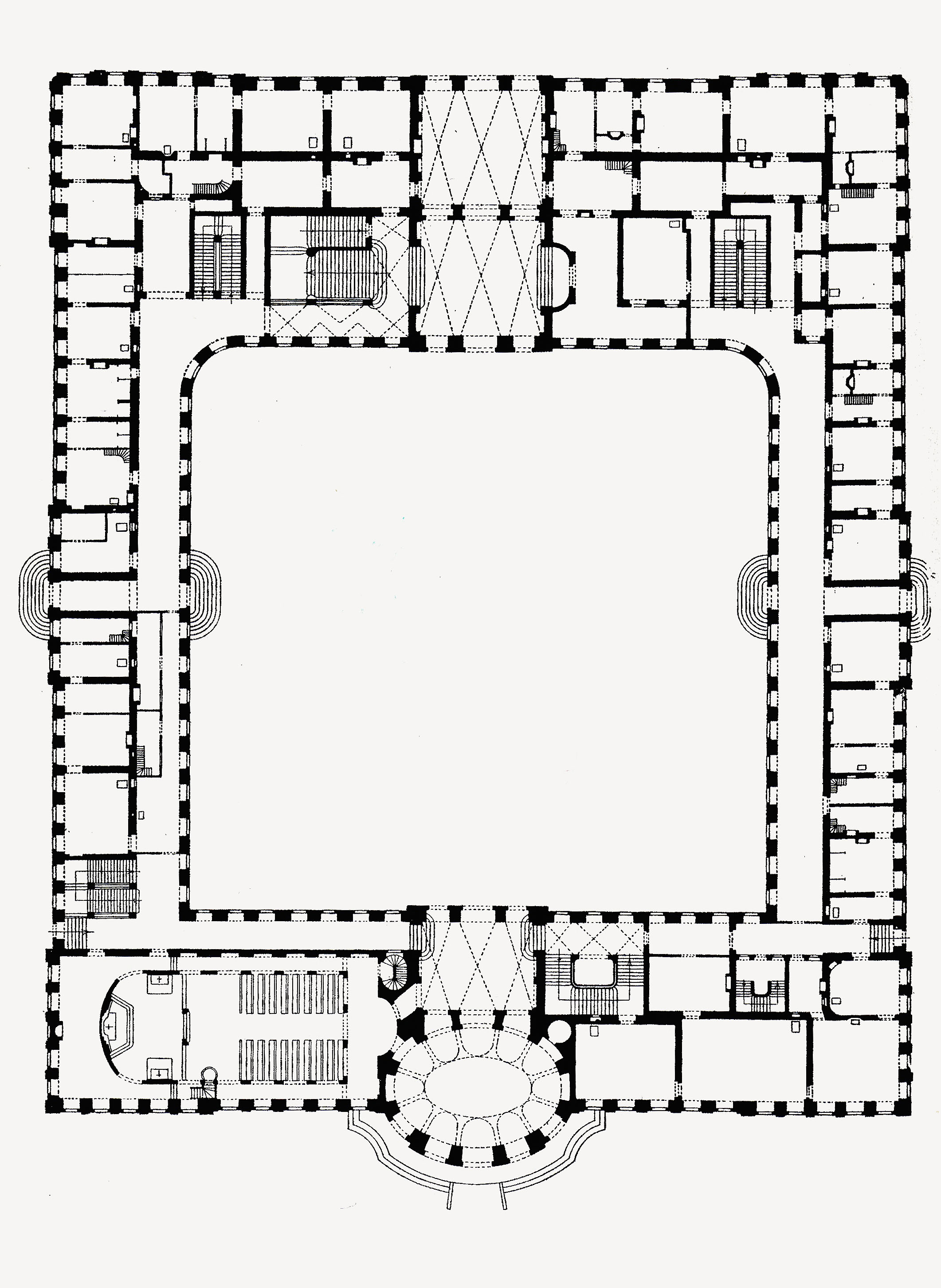 Schloß Hubertusburg 1905 Erdgeschoß